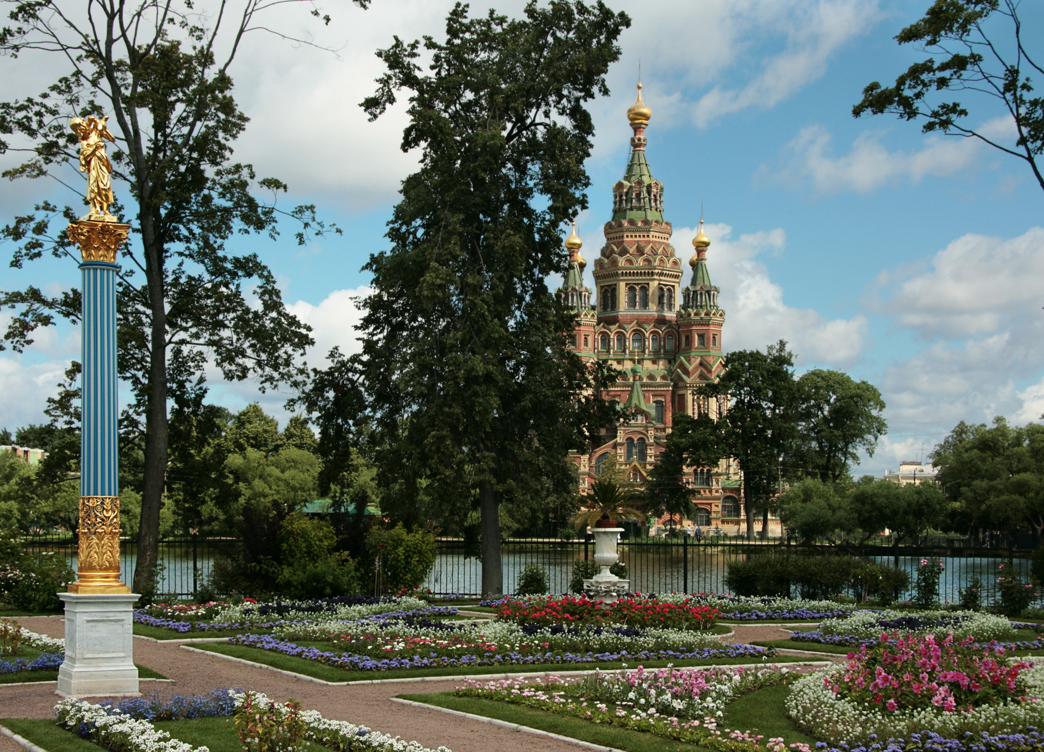 Царицын остров. Собственный сад императрицы Александры Федоровны. Воссоздан цветник, идентичный цветнику XIX века